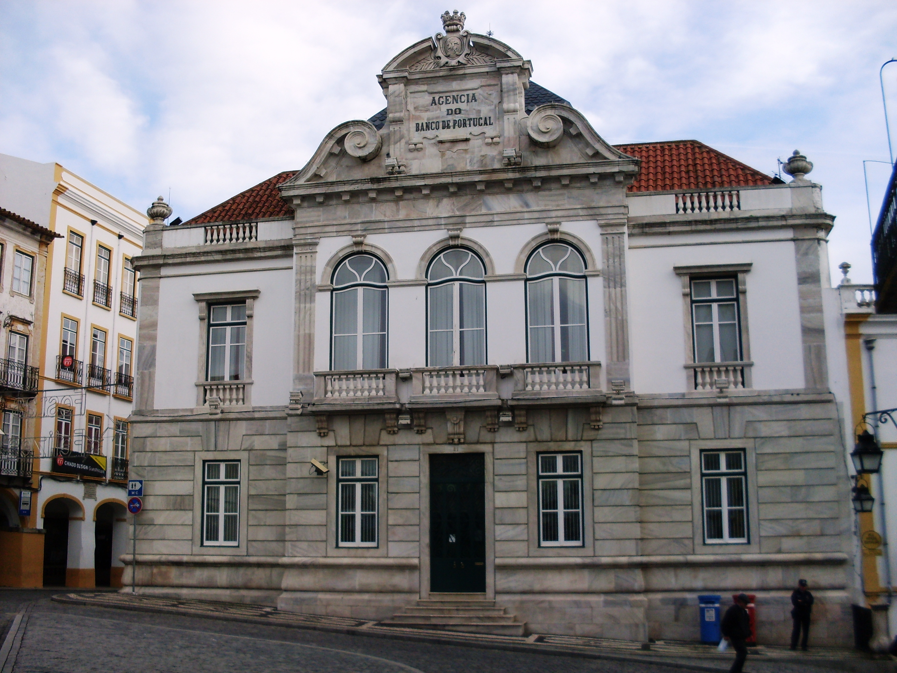 Agência do Banco de Portugal, Évora